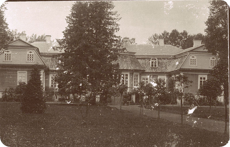 Беларуская (тарашкевіца): Каханавічы (Kachanavičy), сядзіба Храпавіцкіх (Chrapavicki)